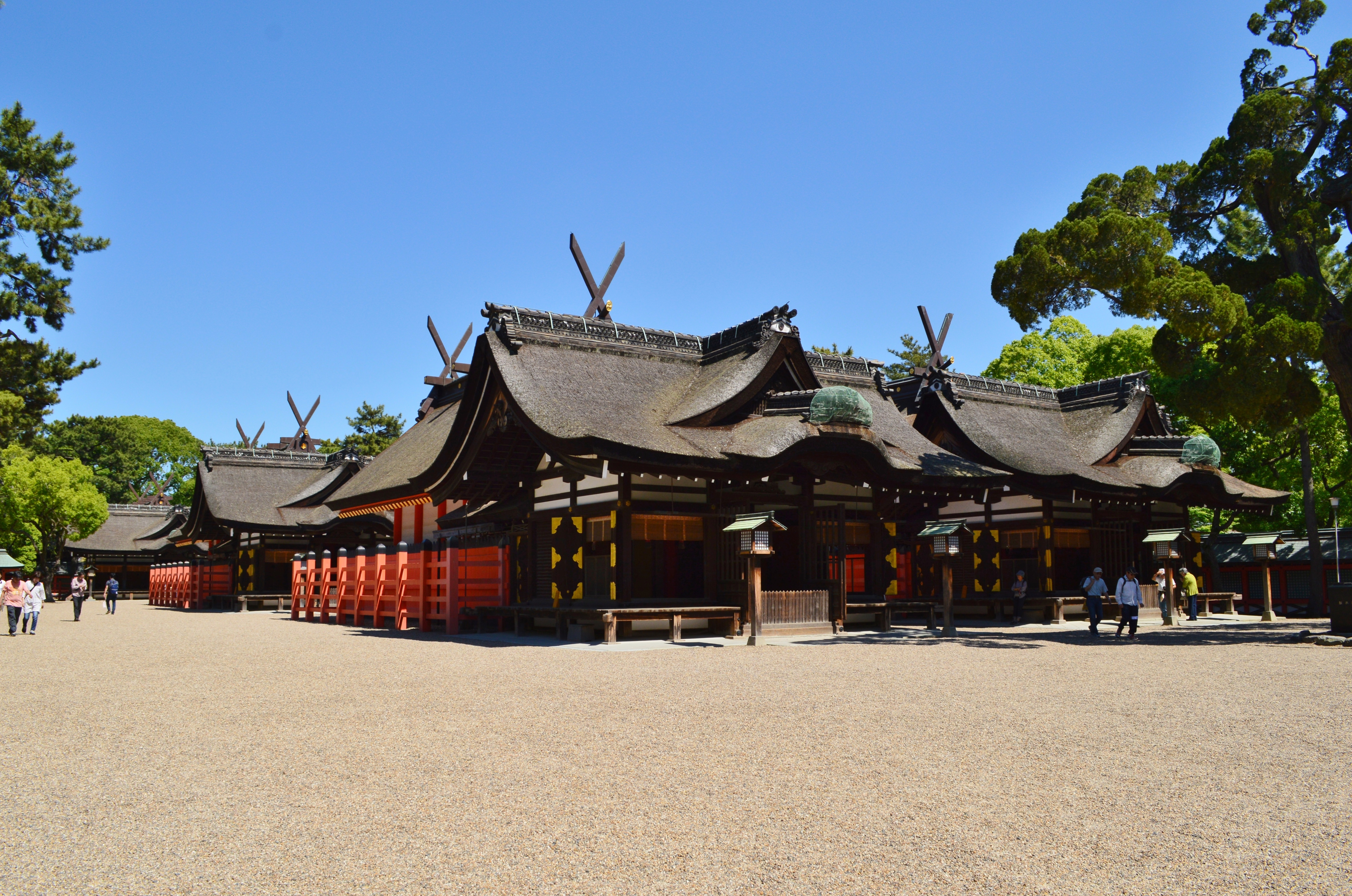 住吉大社 本宮